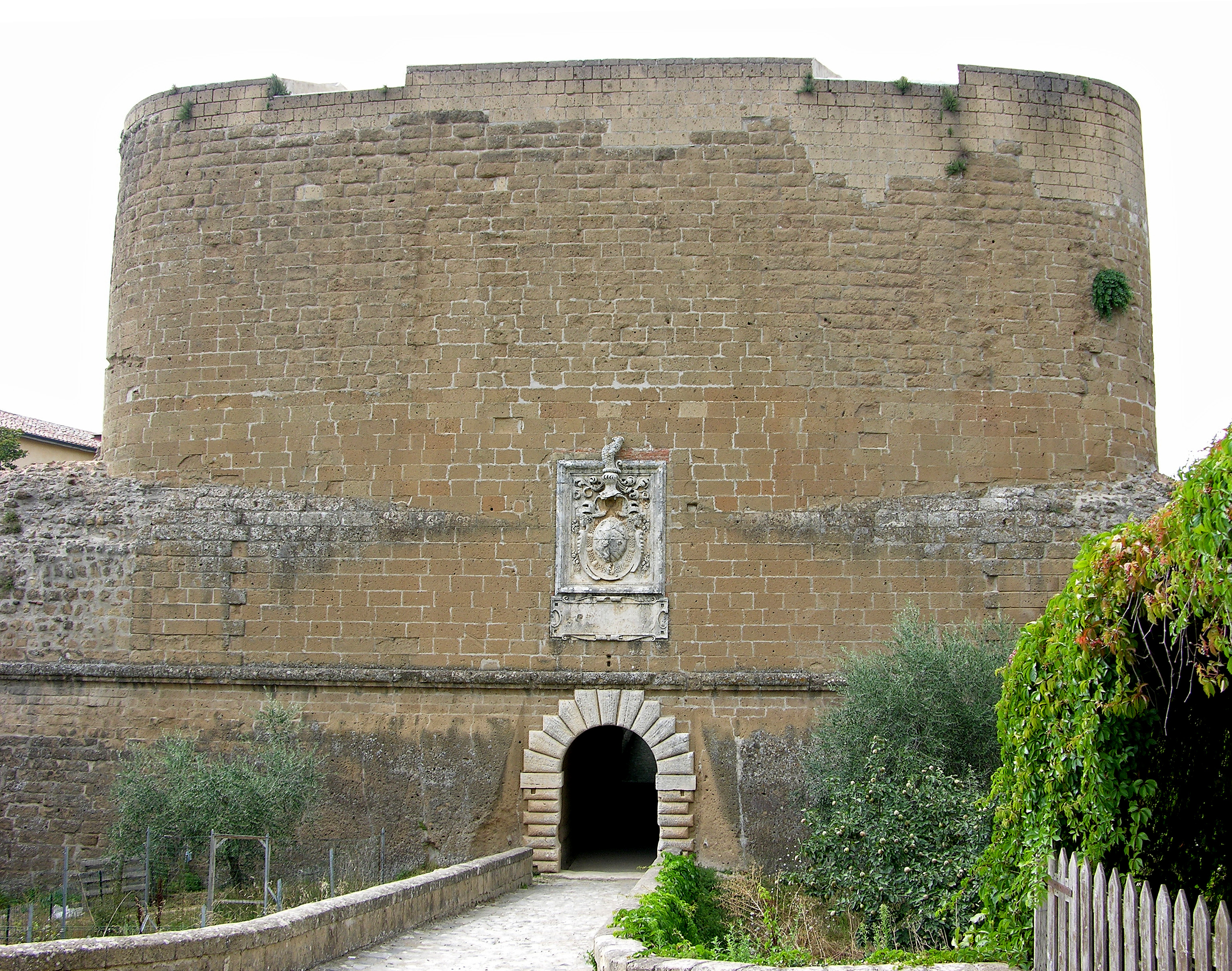 Ingresso della Fortezza Orsini di Sorano (GR)